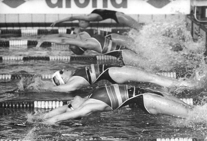 Dresden, Schwimm-Meisterschaft ADN-Hiekel 25.5.90-Dresden: 41. DDR-Meisterschaften im Schwimmen- Erstmals in der DDR-Meisterliste trug sich Dagmar Hase von Chemie Halle (vorn) mit ihrem souveränen Sieg über 200 Meter Rücken ein. Kathrin Wessel (2.v.r.) vom SC Magdeburg belegte den dritten Platz. Abgebildete Personen: Hase, Dagmar: Schwimmerin, DDR